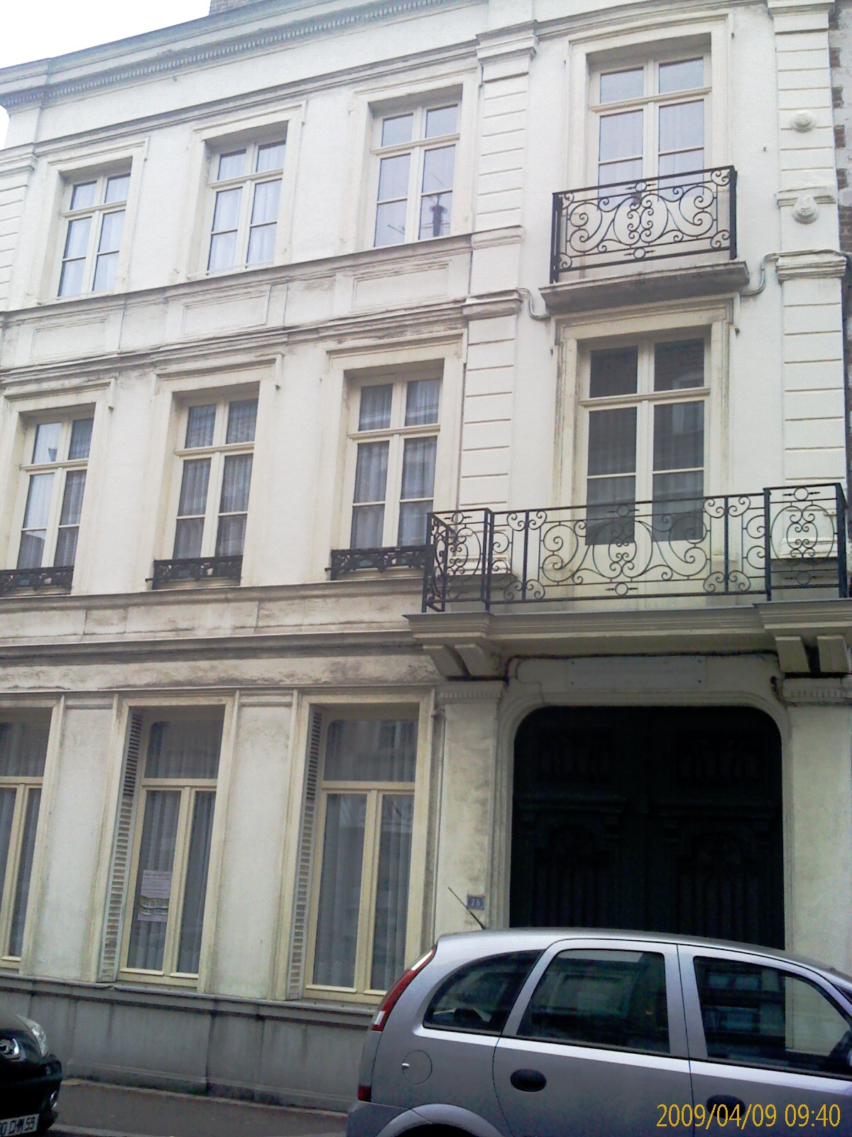 Habitation de Henri-Edmond Delacroix dit Cross (1856-1910) - peintre français pointilliste- 15 rue Jean Bellegambe à Douai